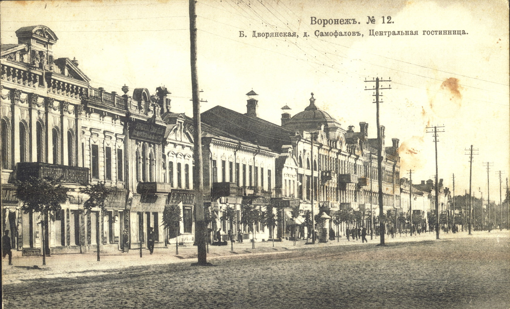 ЦУМ на Большой Дворянской